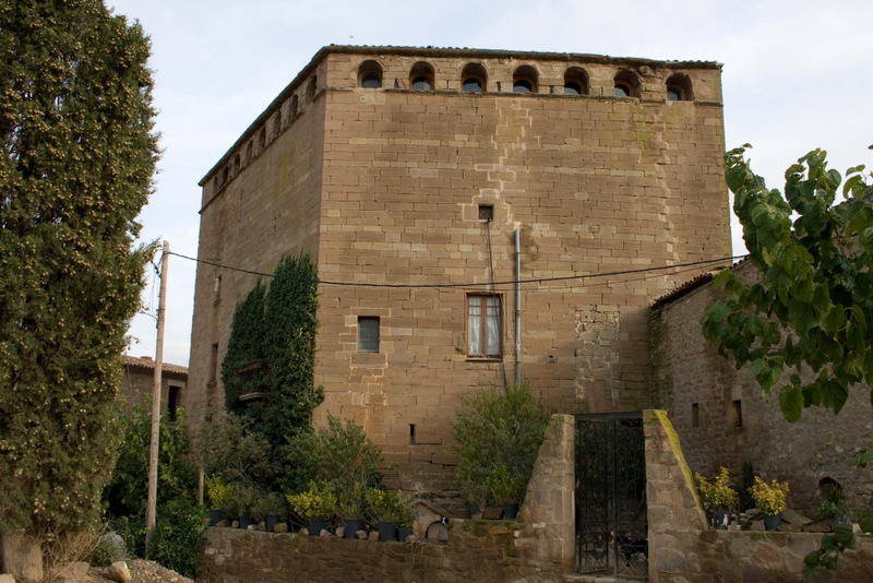 castell d'Aranyó a la Segarra-Catalunya